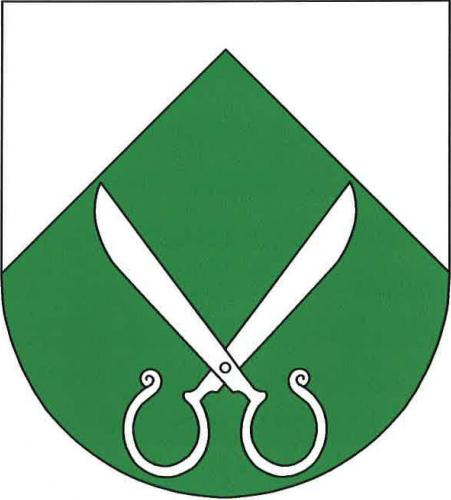 znak, Postřižín, okres Mělník